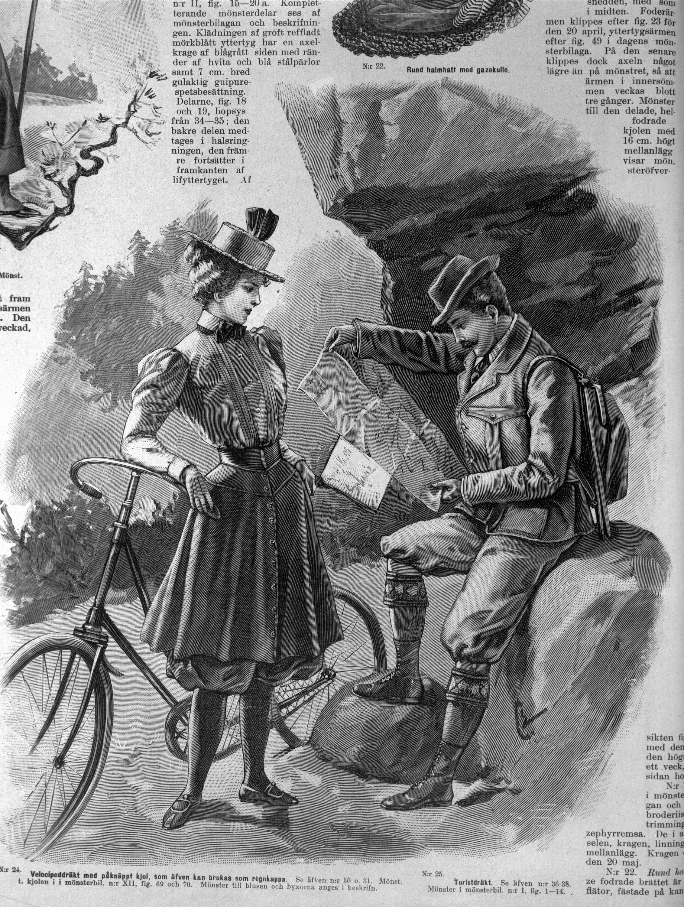 En man och en kvinna i eleganta friluftskläder. Kvinnan lutar sig mot en cykel, mannen sitter på en sten och studerar en karta. "Velocipeddräkt med påknäppt kjol, som äfven kan brukas som regnkappa." samt "Turistdräkt"